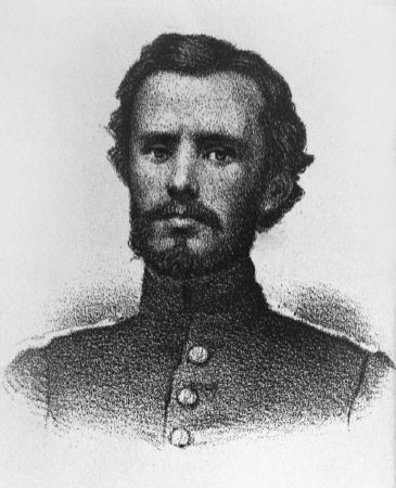 Griechischer Freiheitskämpfer, 19. Jahrhundert